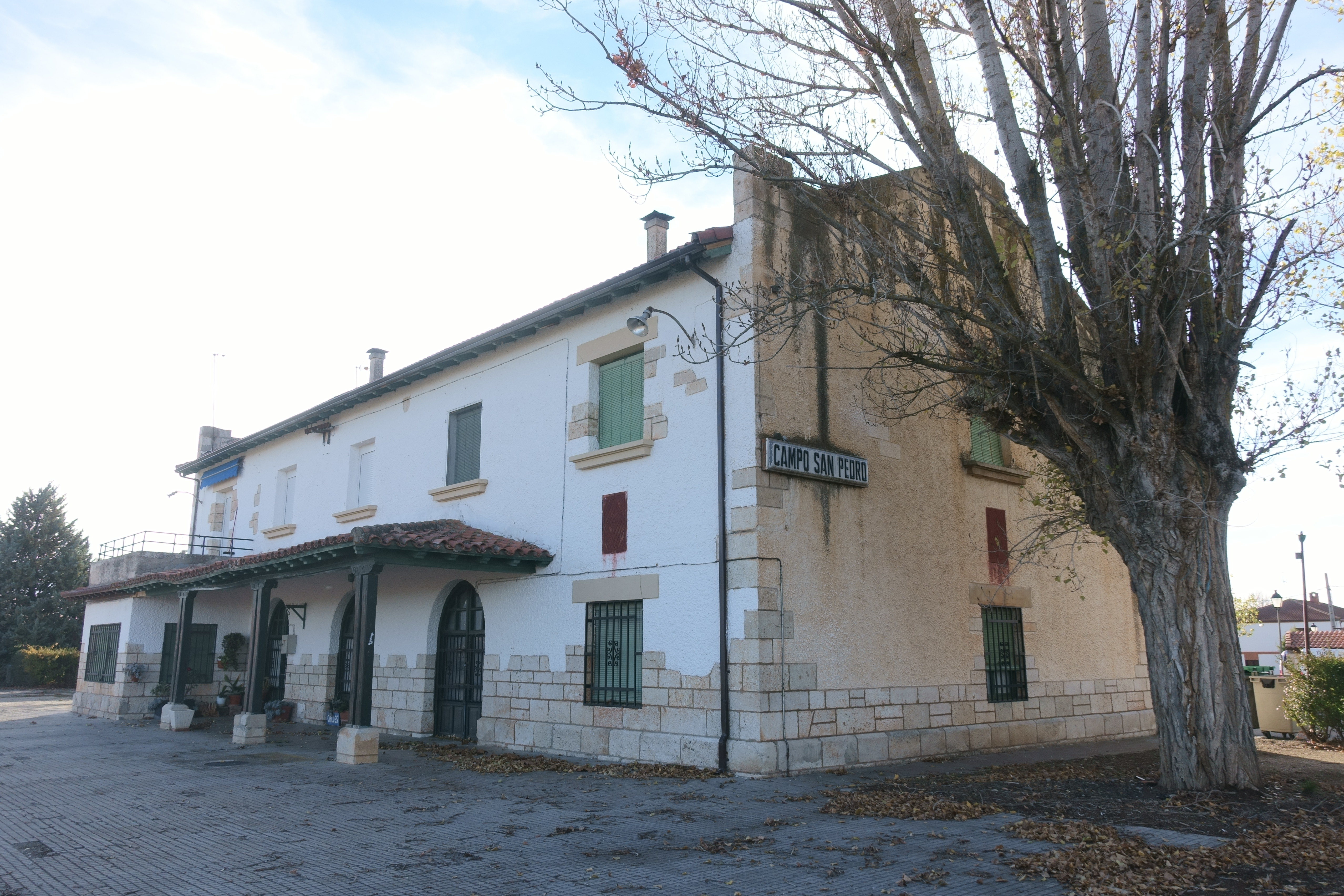 Antiguas instalaciones de la estación de Campo de San Pedro (Segovia, España).